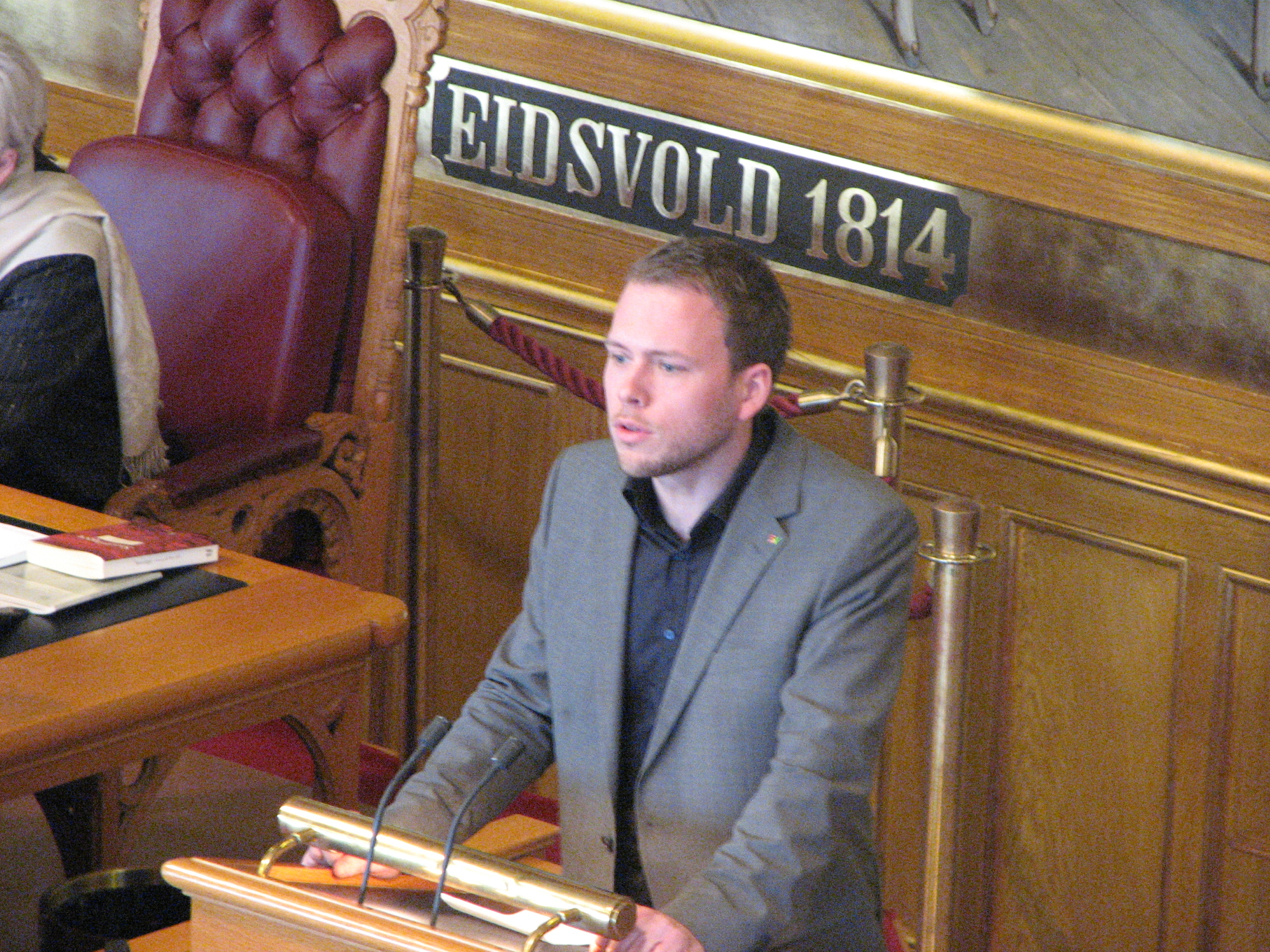 Audun Bjørlo Lysbakken (vara for Ågot Valle) i Stortinget 12. februar 2009.